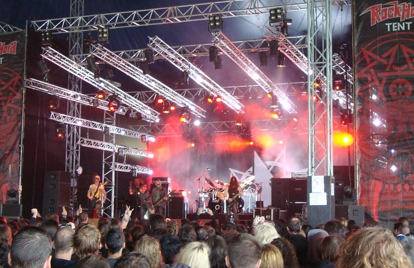 Dødheimsgard, banda noruega de black metal, actuando en el Hellfest Open Air de 2011.